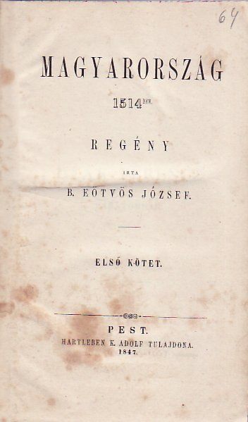 Eötvös József: Magyarország 1514-ben című könyvének belső előlapja